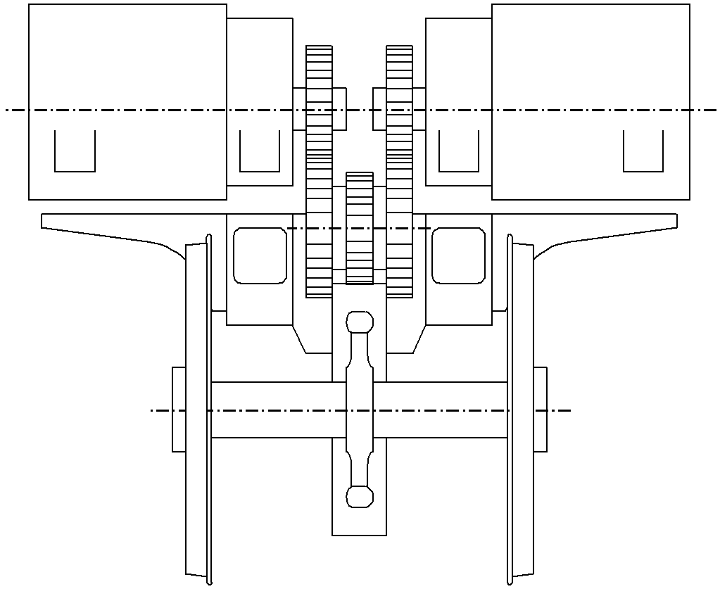 SLM-Universalantrieb mit Zwillingsmotoren und doppeltem Übersetzungsgetriebe